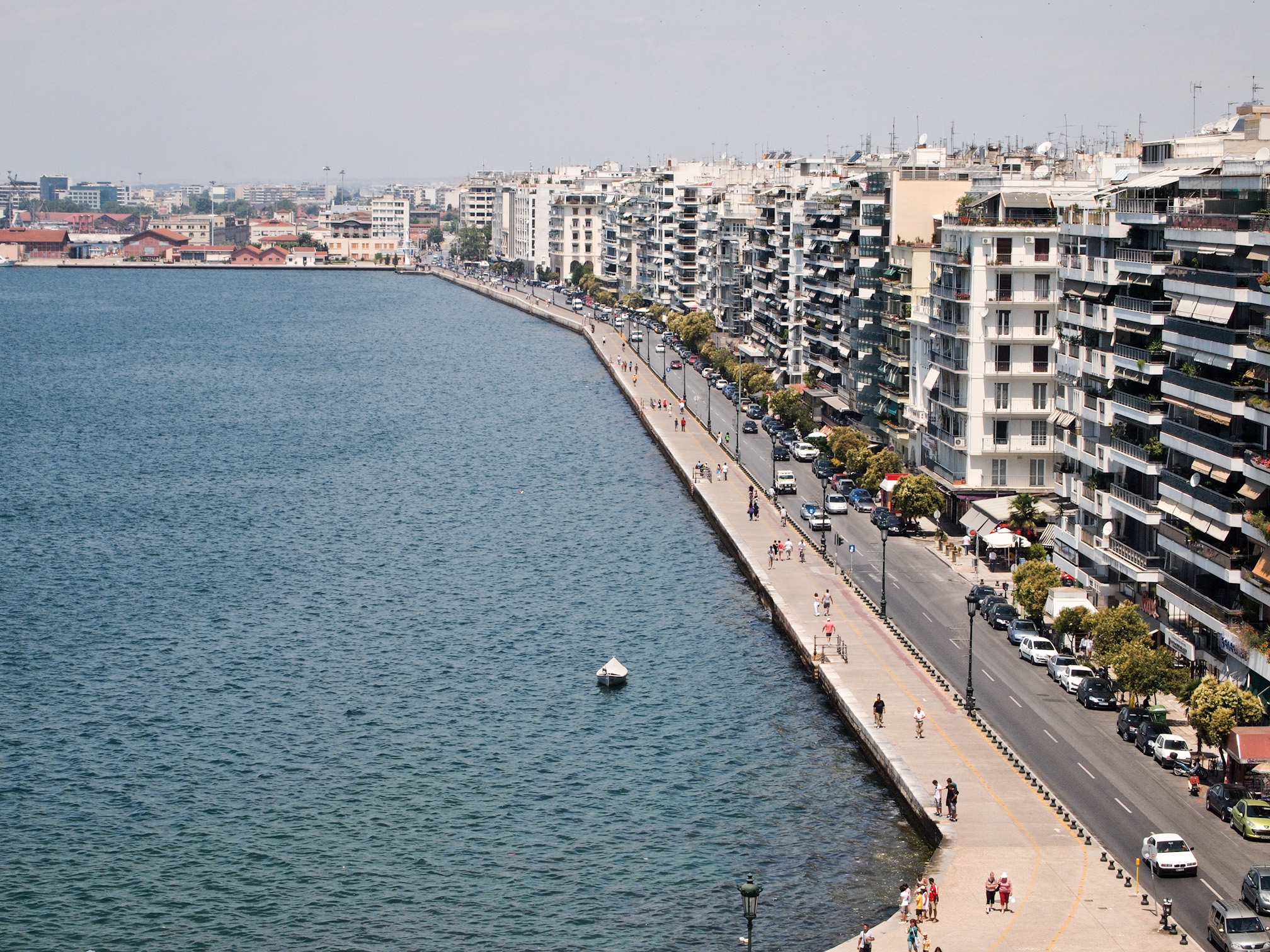 Λεωφοροσ Νικησ